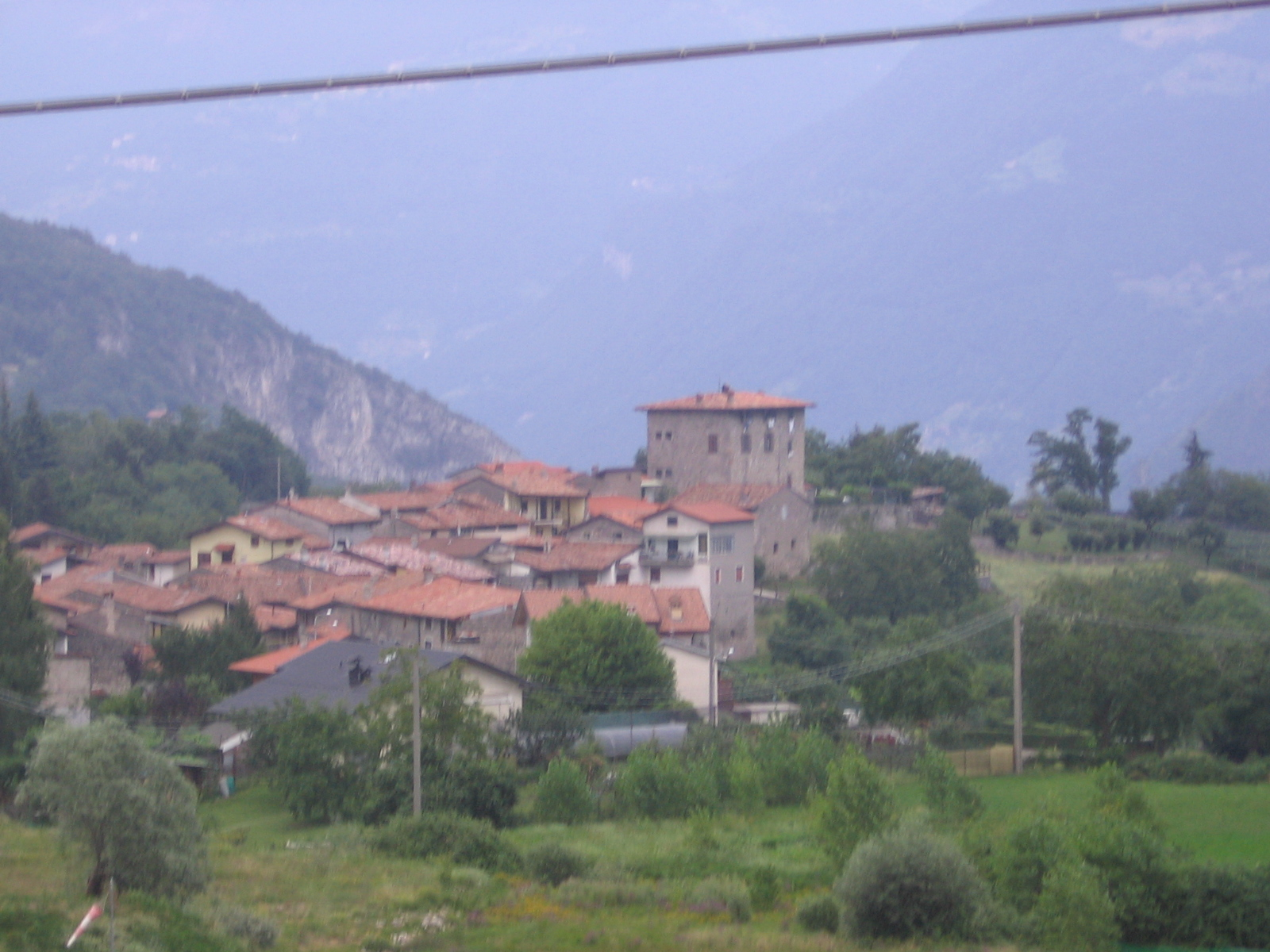 Solto Collina, Bergamo, Italia